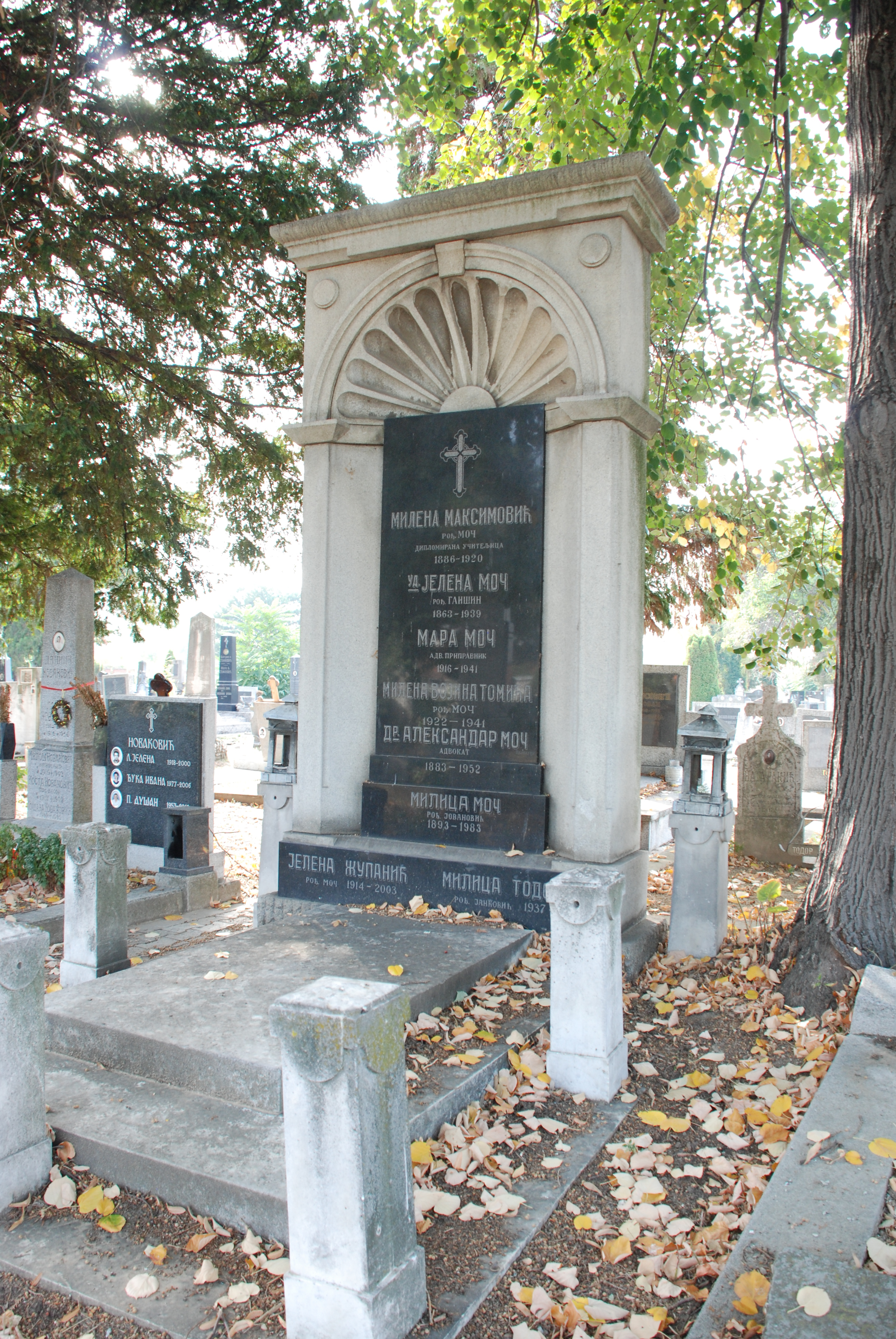 1883-1952 адвокат, градски капетан и председник Матице српске, један од првака Удружене опозиције, после рата председник Народног фронта